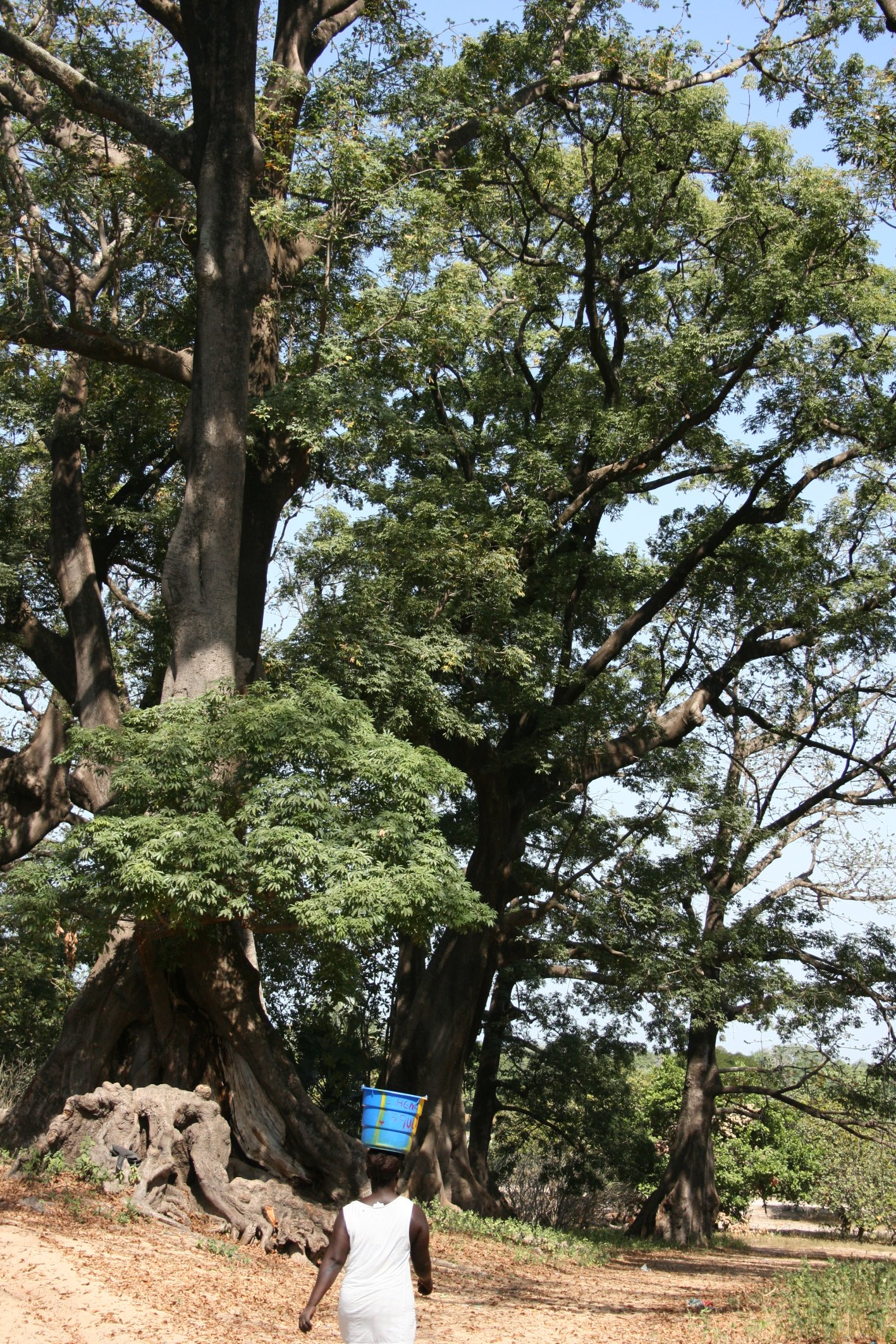 Fromager, autour du village de Diembéring en Casamance (Sénégal)